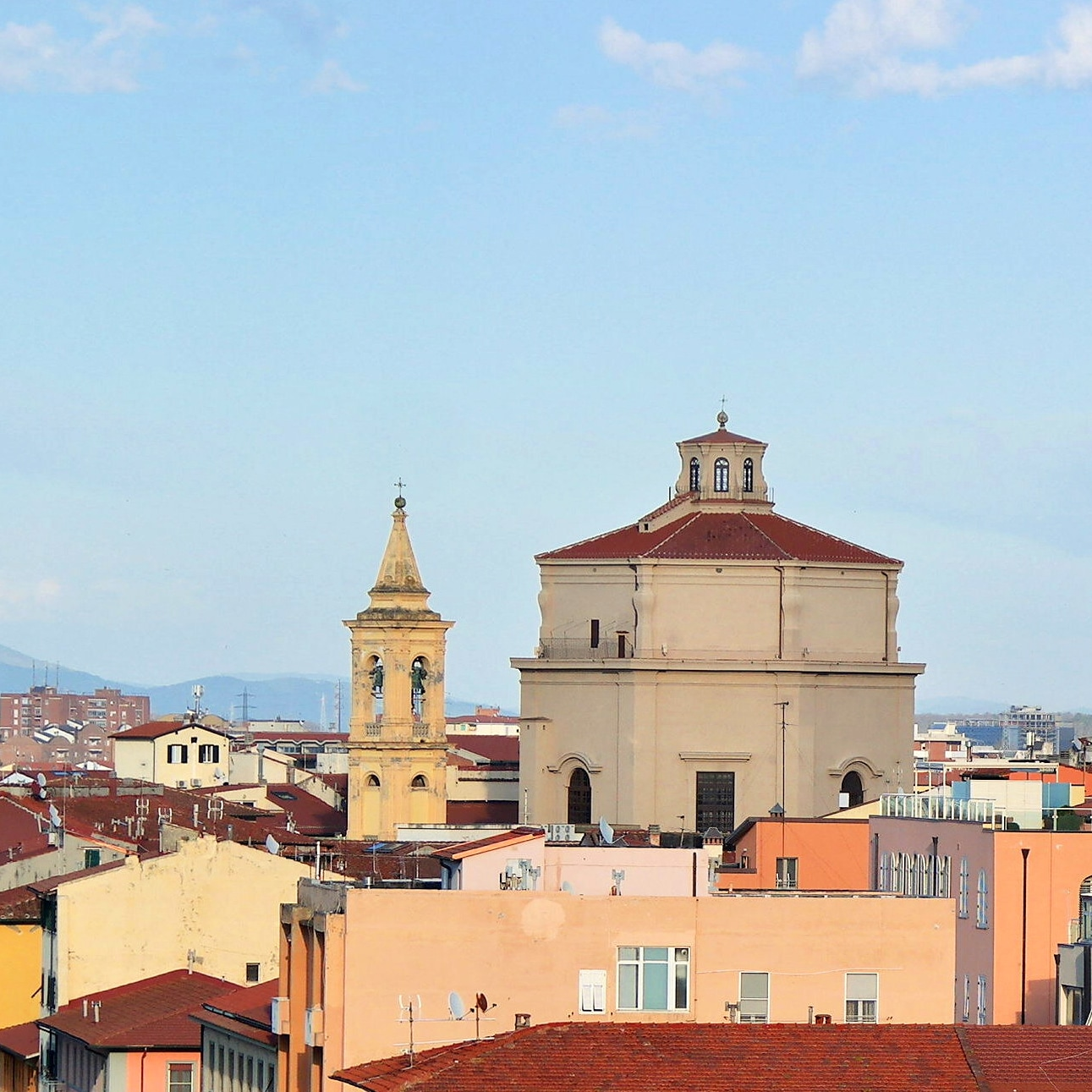 Veduta del quartiere Venezia (in cui svetta la slanciata struttura della chiesa di santa Caterina) vista dalla torre della fortezza Vecchia a Livorno